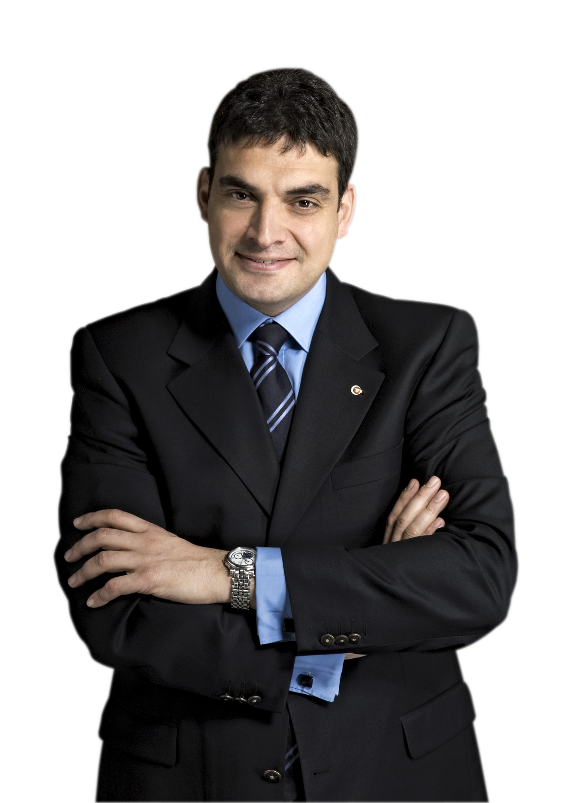 24. Dönem İstanbul Milletvekili, CHP Genel Başkan Yardımcısı